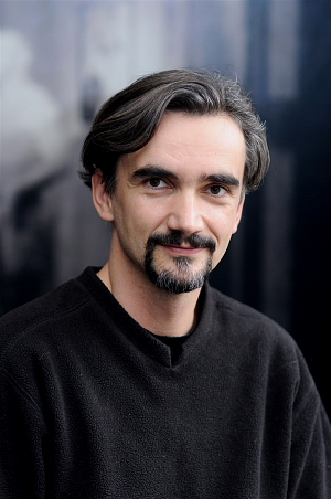 Martin Myšička (nar. 1970) je český herec a divadelní režisér.